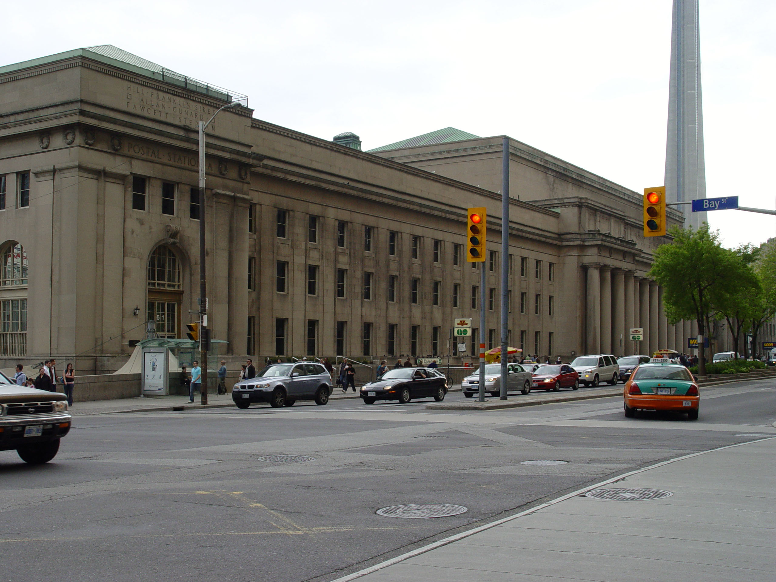 Die Union Station in Toronto Kanada.